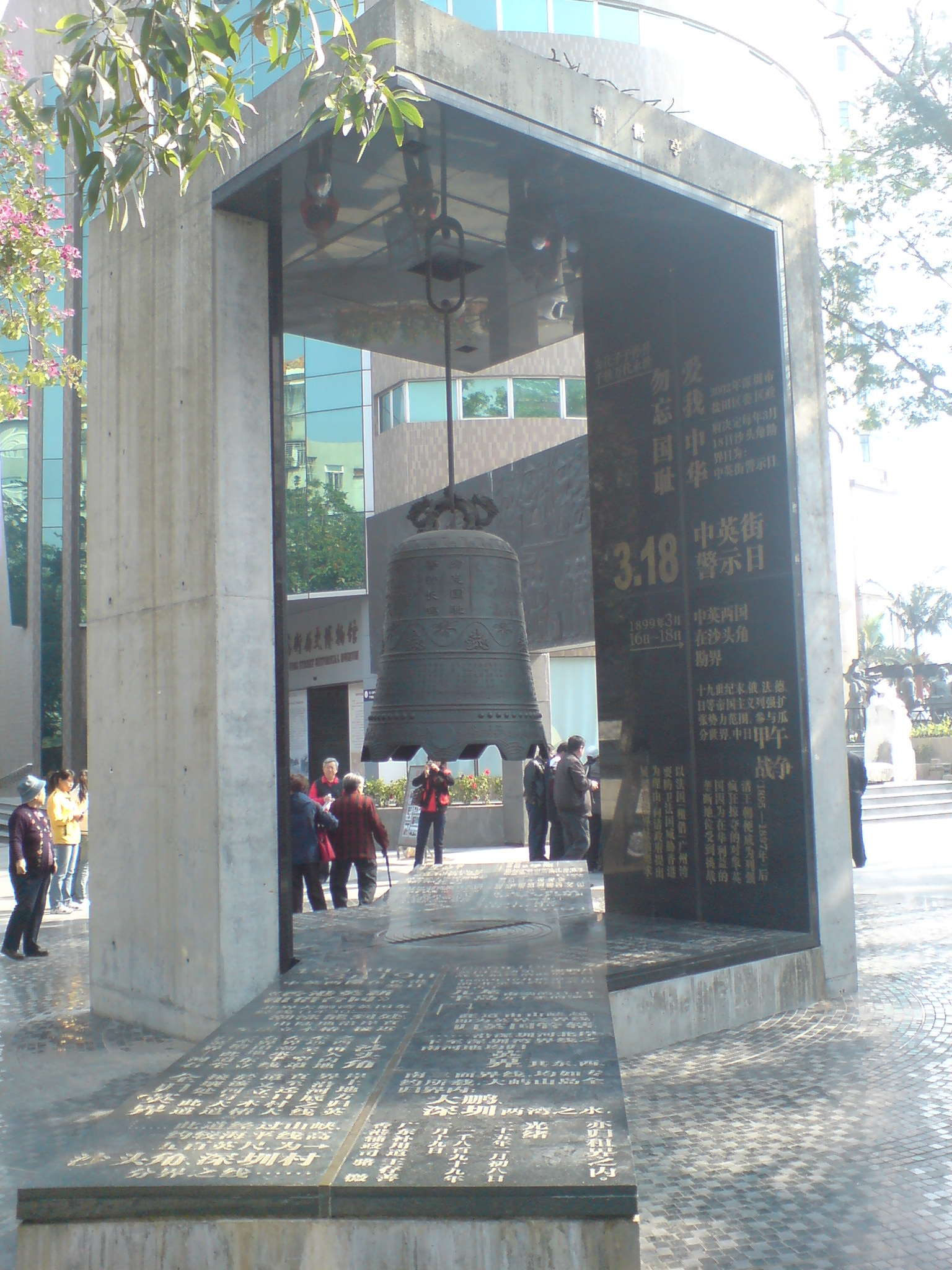 中文（中国大陆）: 中英街历史博物馆附近的警世钟